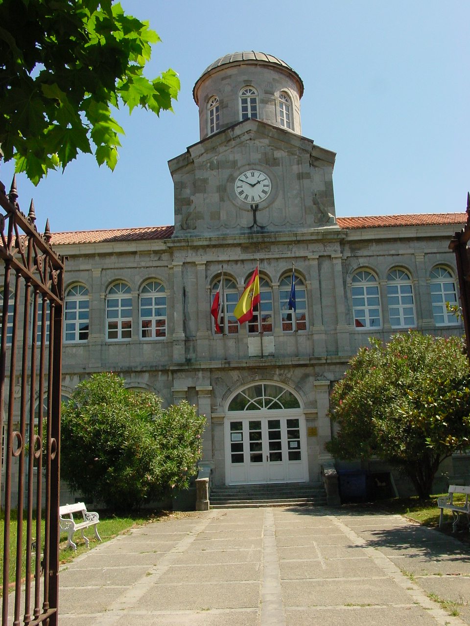 El Instituto de Educación Secundaria Marqués de Manzanedo se encuentra en la localidad cántabra de Santoña, España. Es un edificio neoclásico realizado por el arquitecto Antonio Ruiz de Salces en 1871.